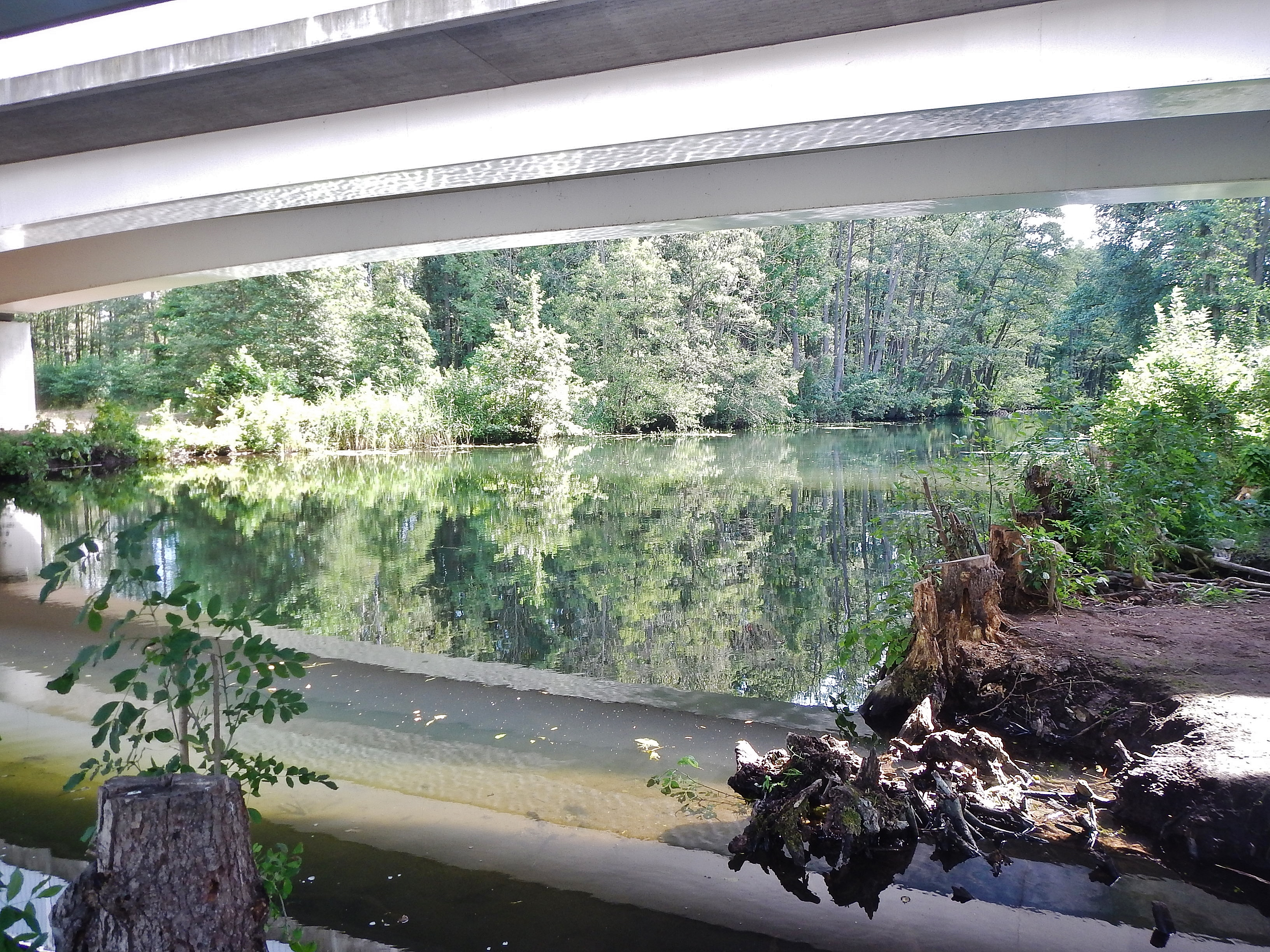 Der Fluss Wakenitz unter den Ostseeautobahn A20